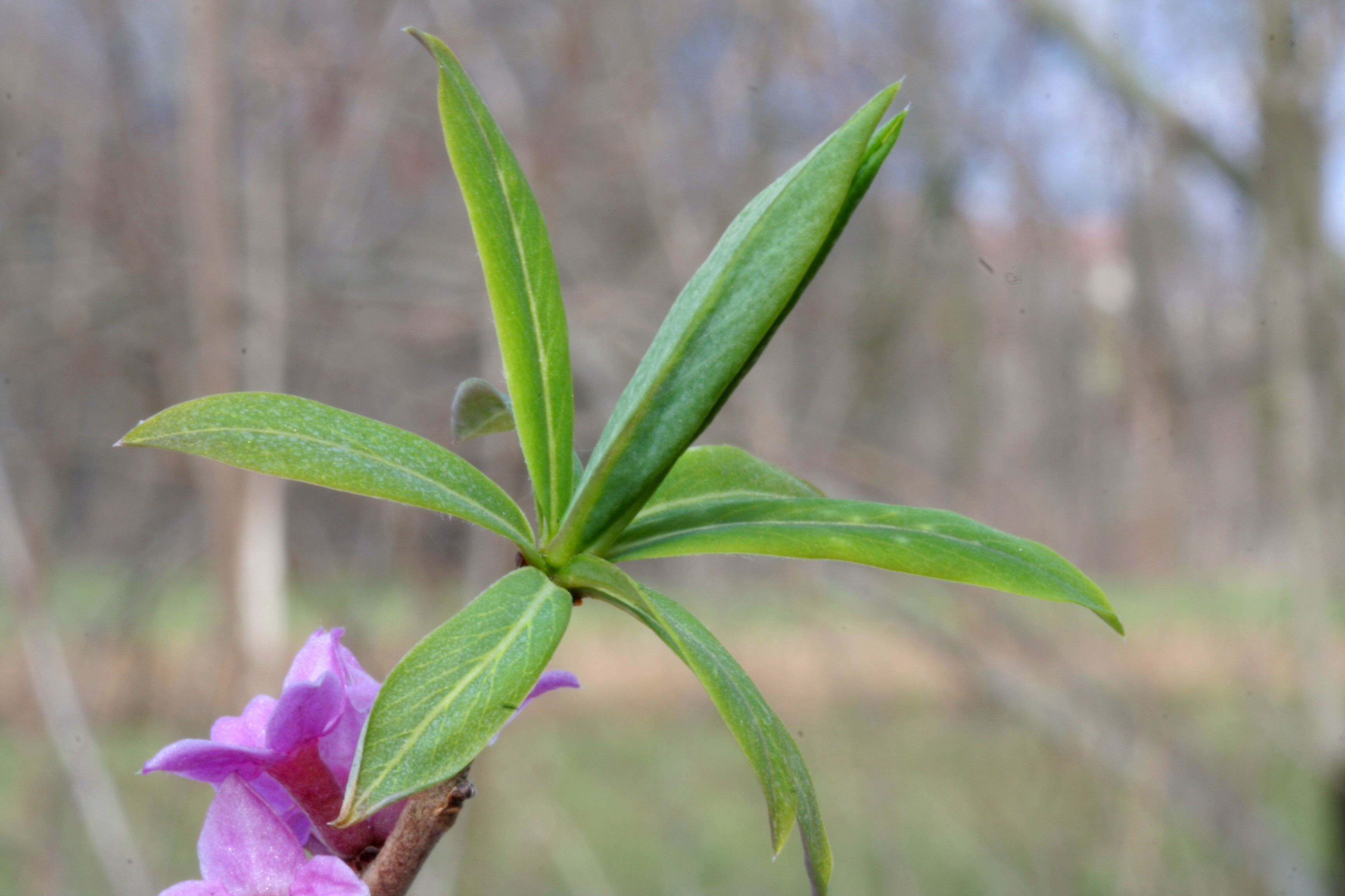 Daphne_mezereum (Dafne mezereo) Località : Pasa, Sedico (BL), 356 m s.l.m.